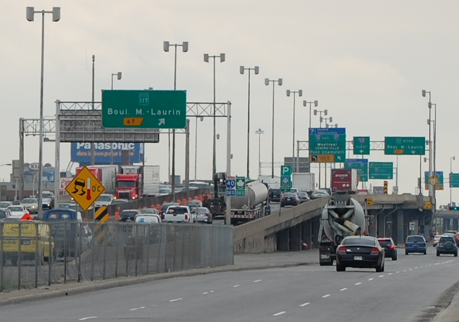 Autouroute 40 direction sud-ouest un peu avant la jonction avec l'Autoroute Décarie